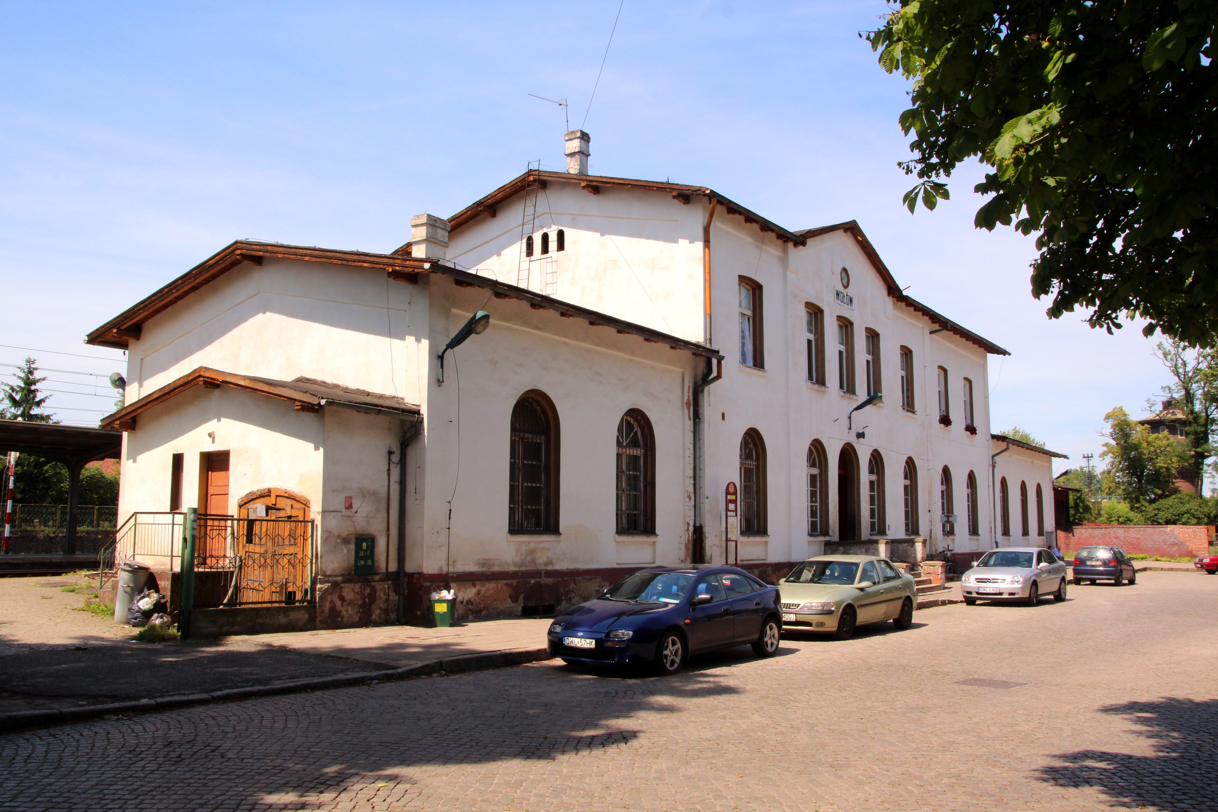 Budynek dworca kolejowego w Wołowie